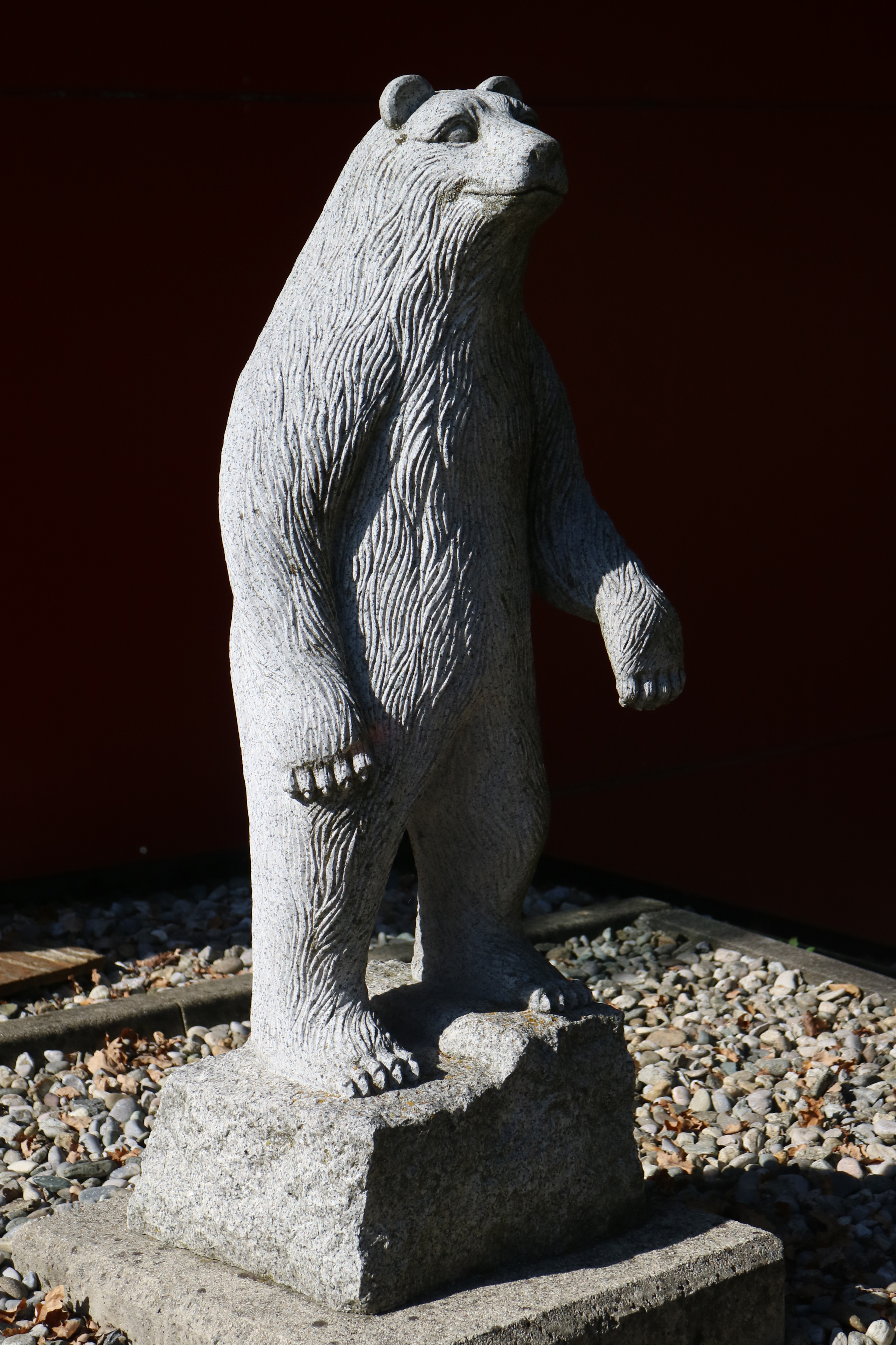 Statue zum Windorfer Bärenfang in Pirka (Steiermark), errichtet 2010 anlässlich der 25-jährigen Partnerschaft der Gemeinden Windorf (Bayern) und Pirka/Windorf